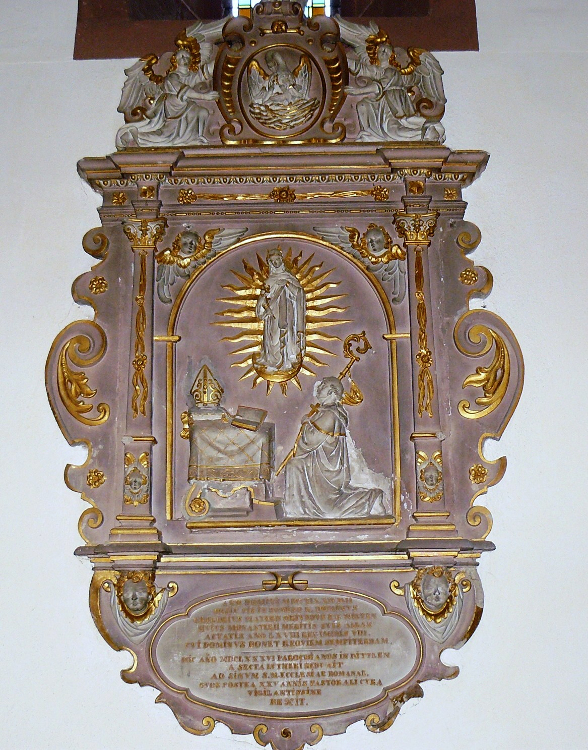 Dalle funéraire de l'abbé Grégoire, né Martin Matern en 1651 à Willgottheim mort en 1719.